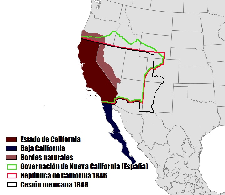 Irredentismo californiano.